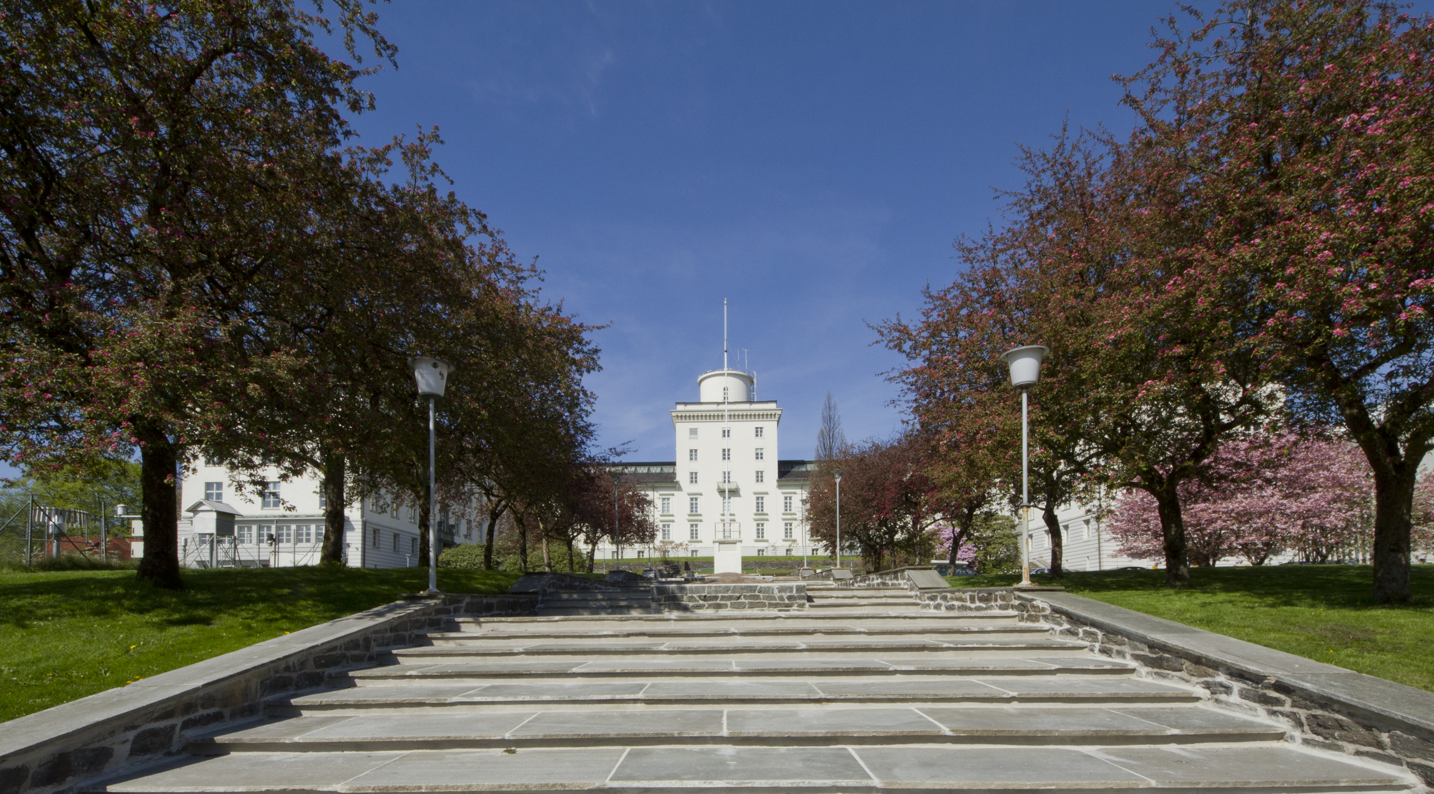 Florida, Nygård, Bergen, Hordaland, Norway